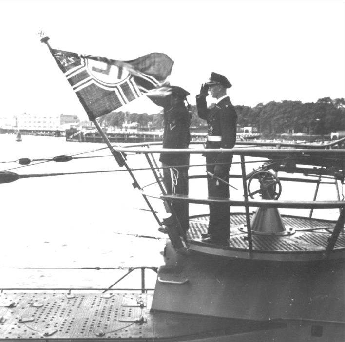 Indienststellung des U-Boots 213